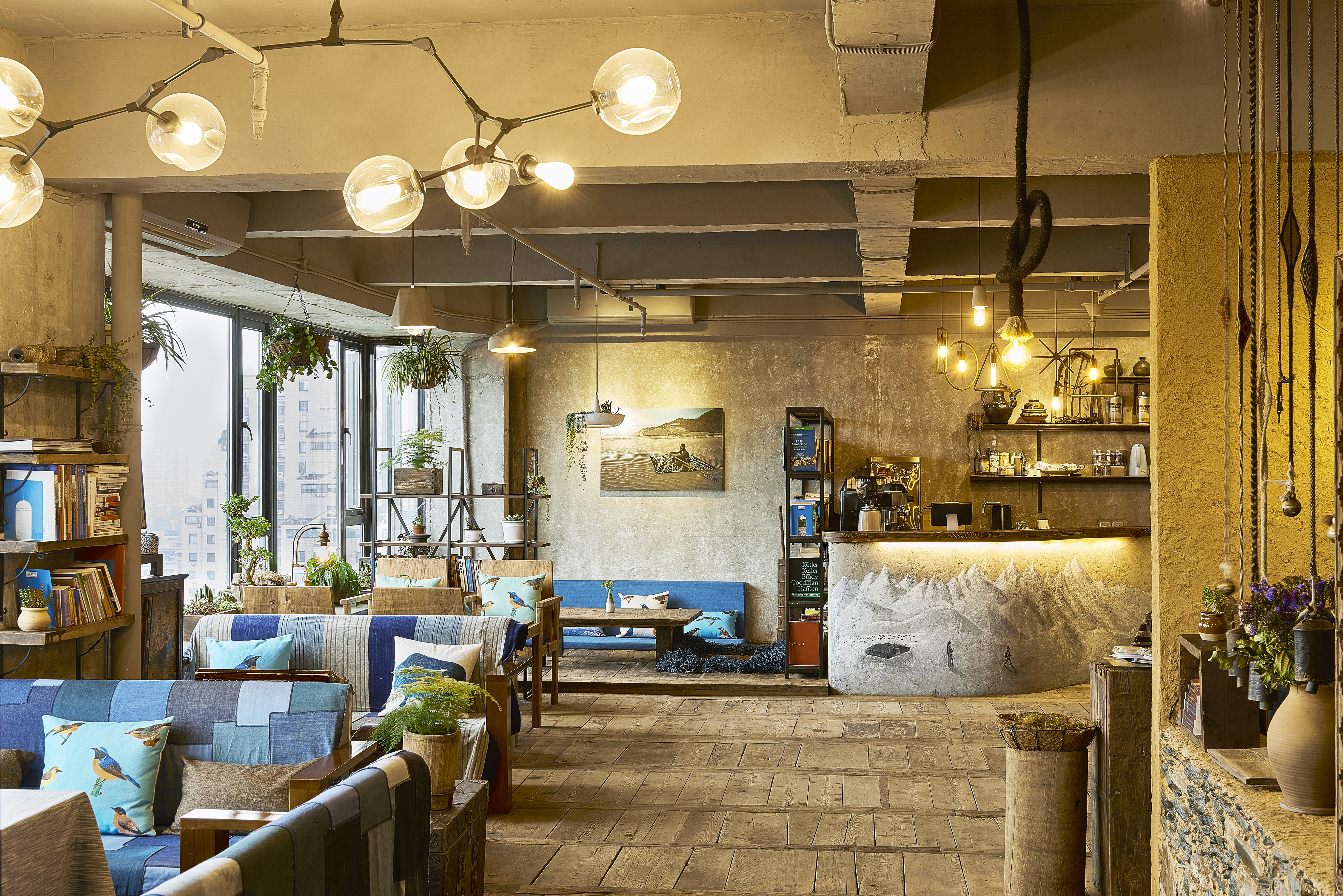 བོད་ཡིག: ཆ་རུ་ལས་ཁྱིམ་གྱི་ནང་།